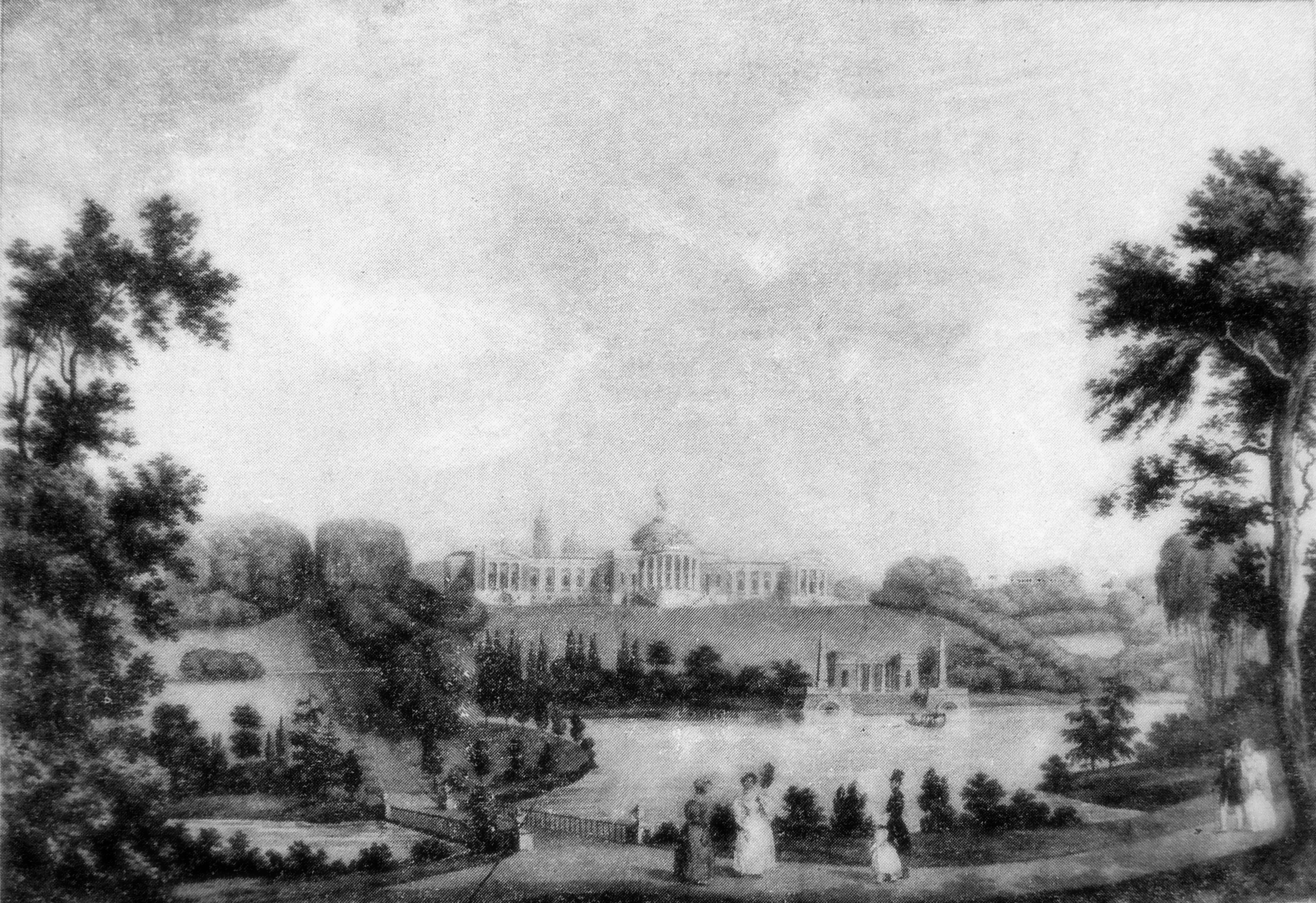 Ахтырка. Общий вид усадьбы 20-е годы XIX века. Литография середины XIX века.